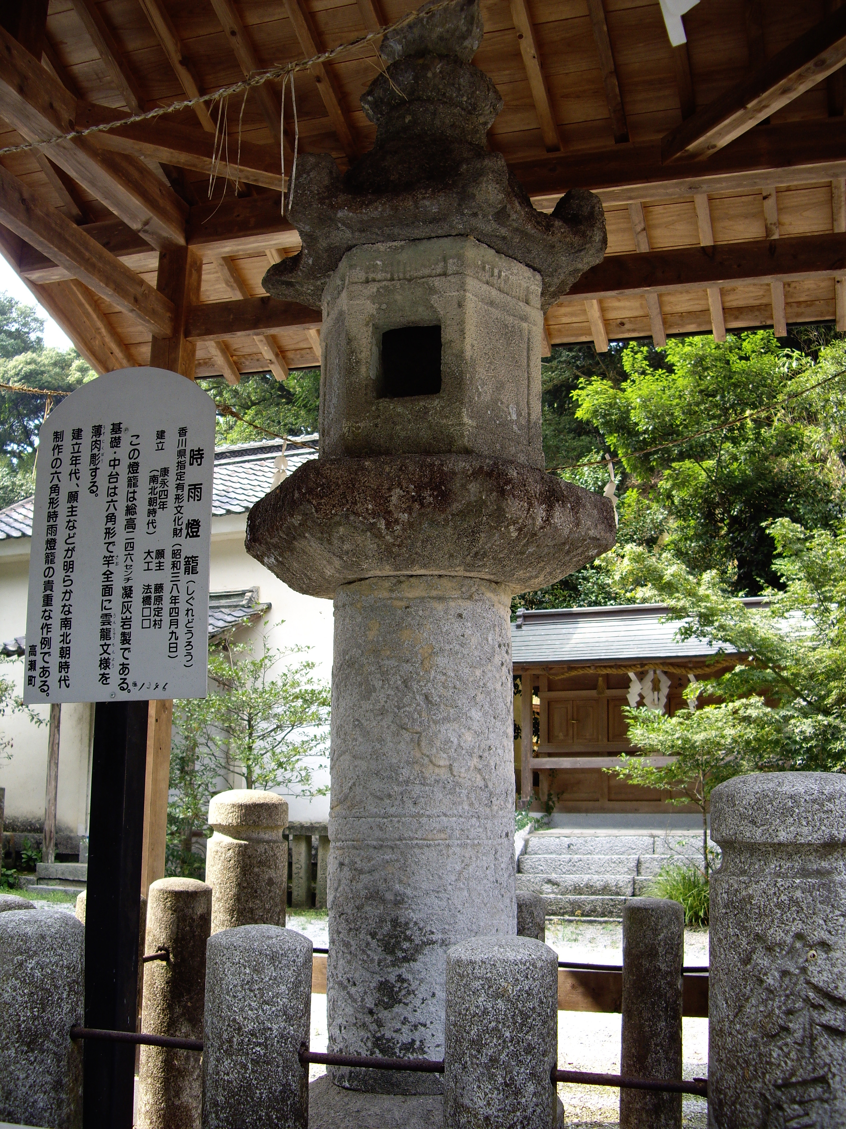 大水上神社（時雨燈籠） - 日本国香川県三豊市